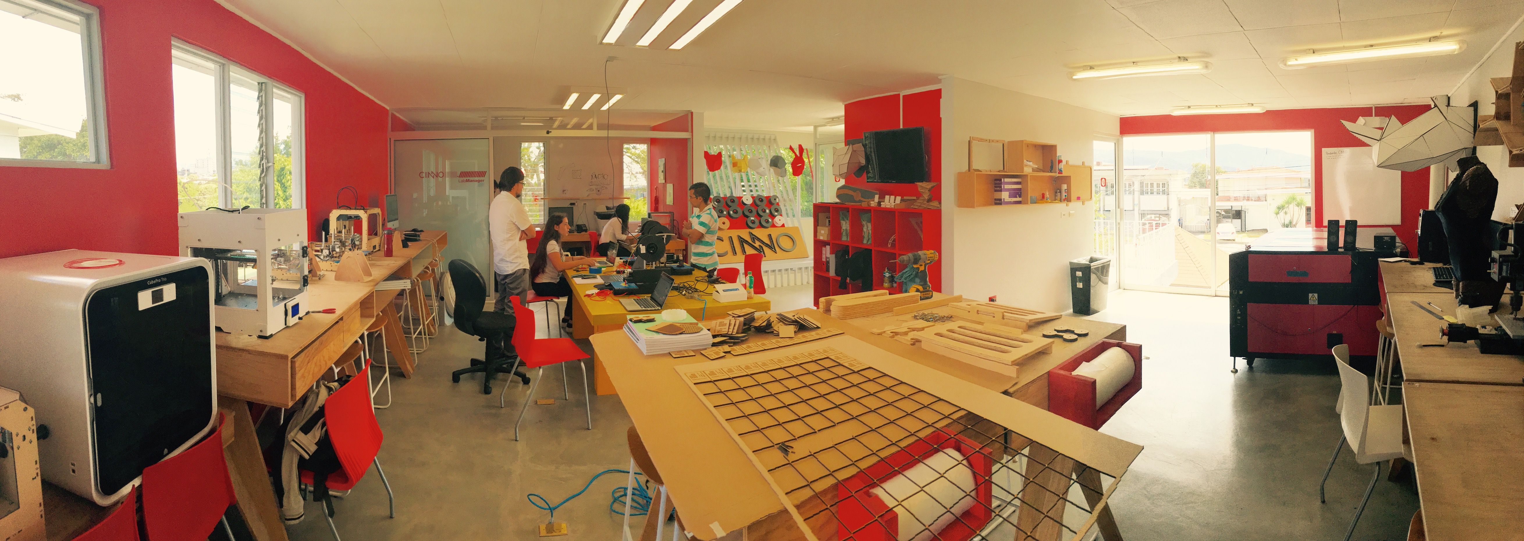 El Centro de Investigación para la Innovación (CINNO) es una iniciativa de la Universidad VERITAS que busca convertirse en el referente a nivel nacional y latinoamericano en el desarrollo, enseñanza, utilización y diseño de tecnologías aplicadas al arte, diseño, ciencia y a la educación creativa en América Latina, marcando un liderazgo en el movimiento de fabbers y makers.